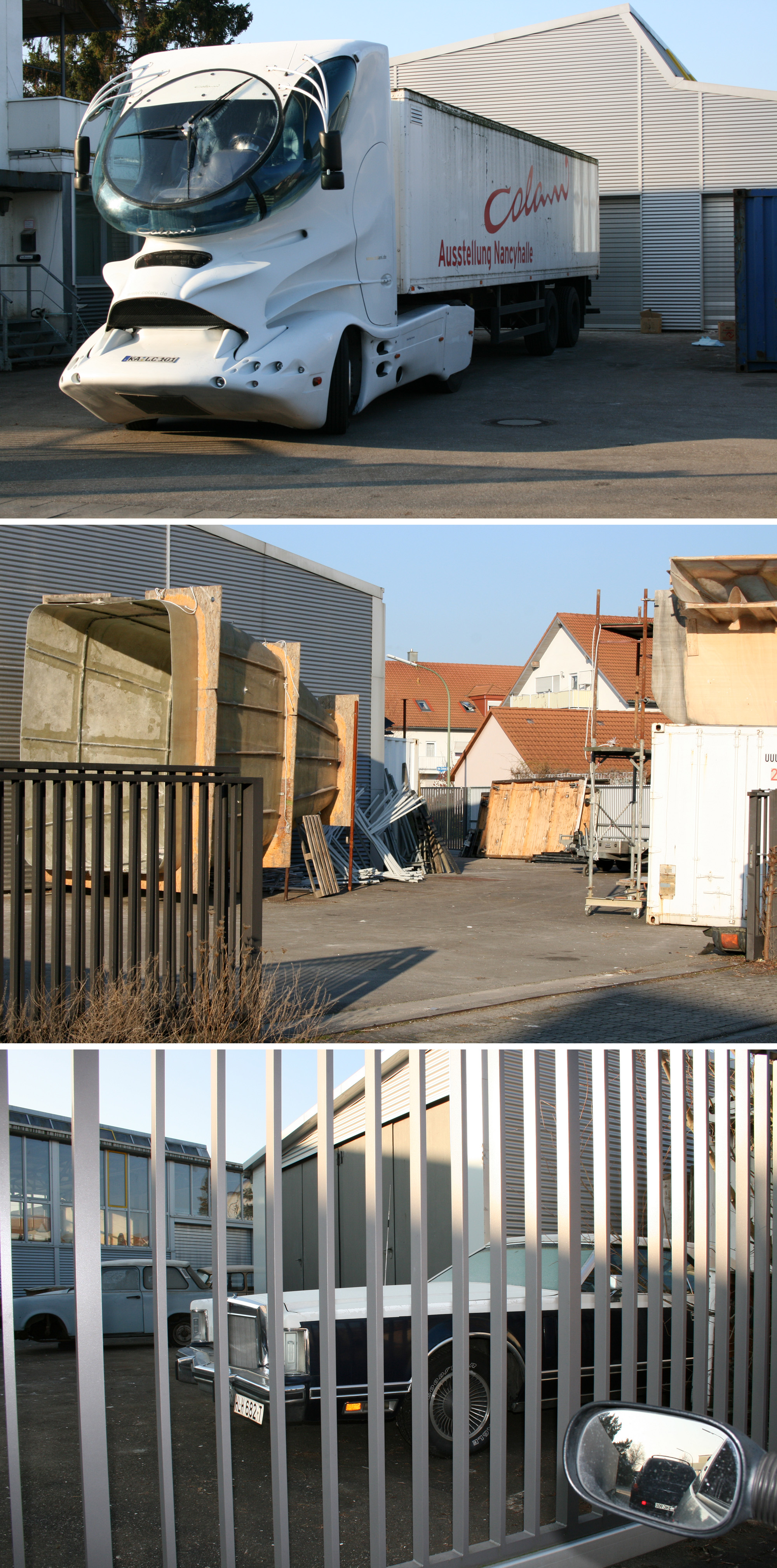 Luigi Colani Design Fabrik in Karlsruhe... hier wird die Welt runder und irgendwie neu erschaffen